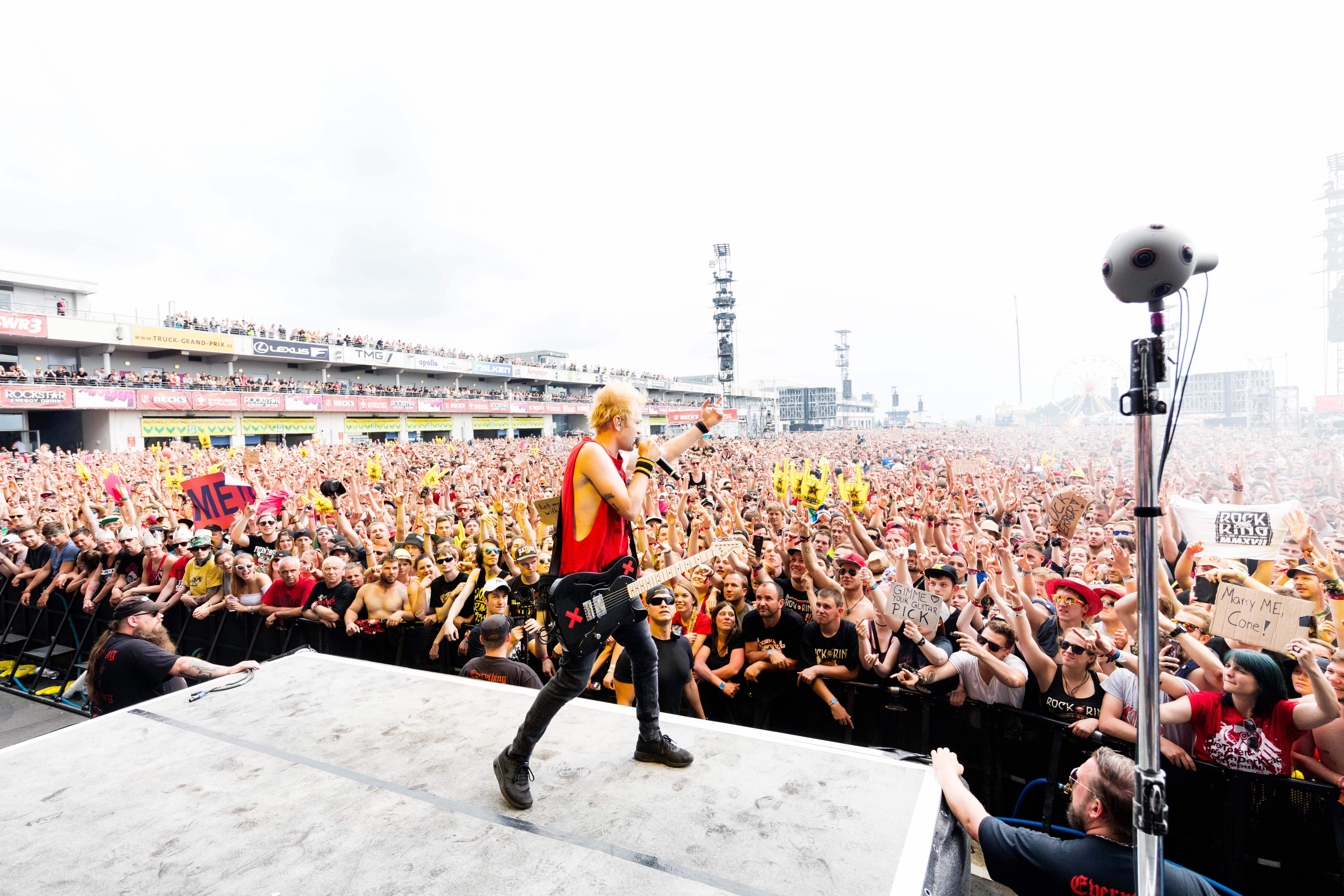 Sum 41 during Rock am Ring at Nürburgring, Nürburg, Rheinland Pfalz, Germany on 2017-06-03, Photo: Sven Mandel